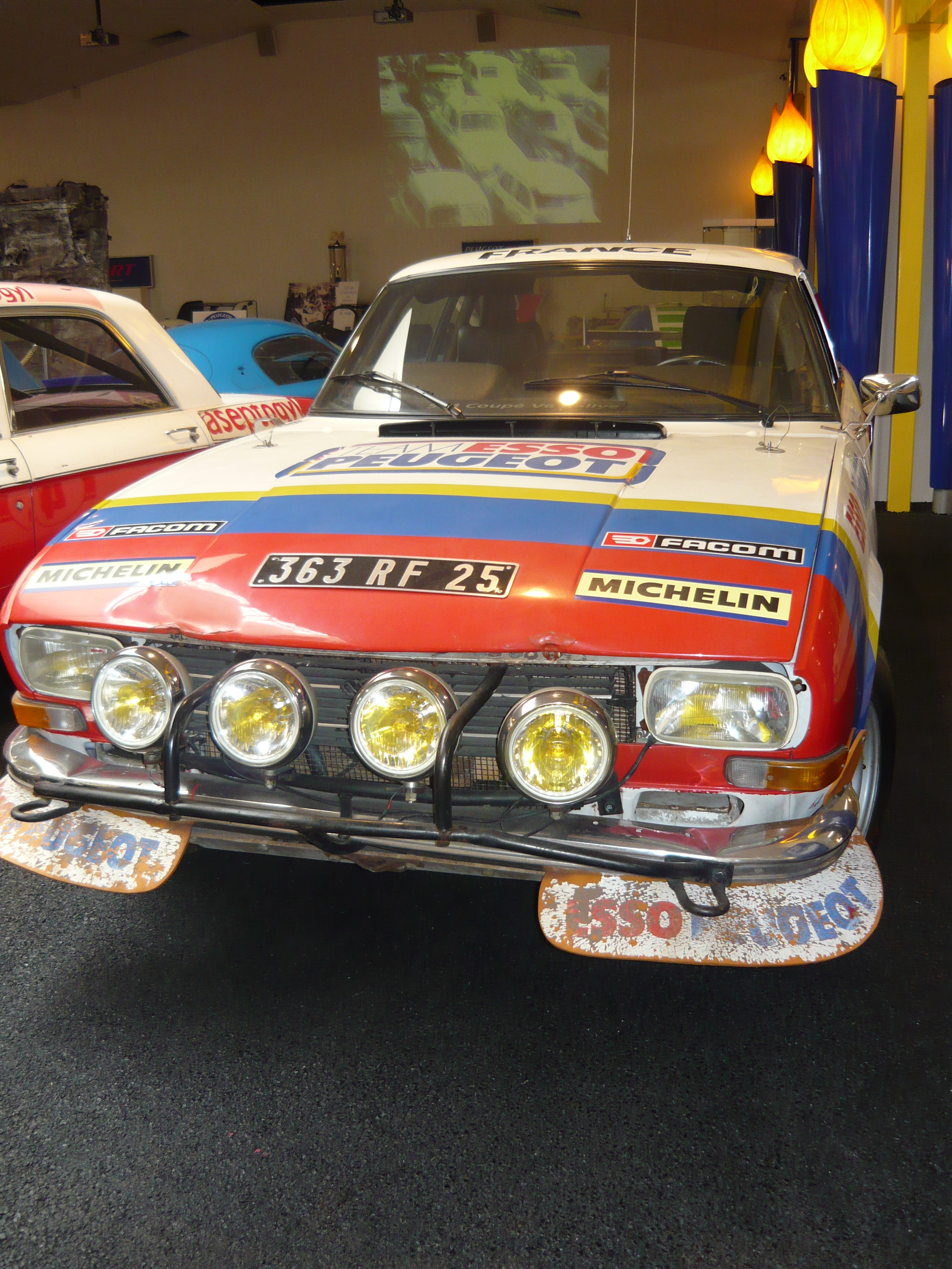 Peugeot 504 V6 (1978) de Jean-Pierre Nicolas du Safari Rally